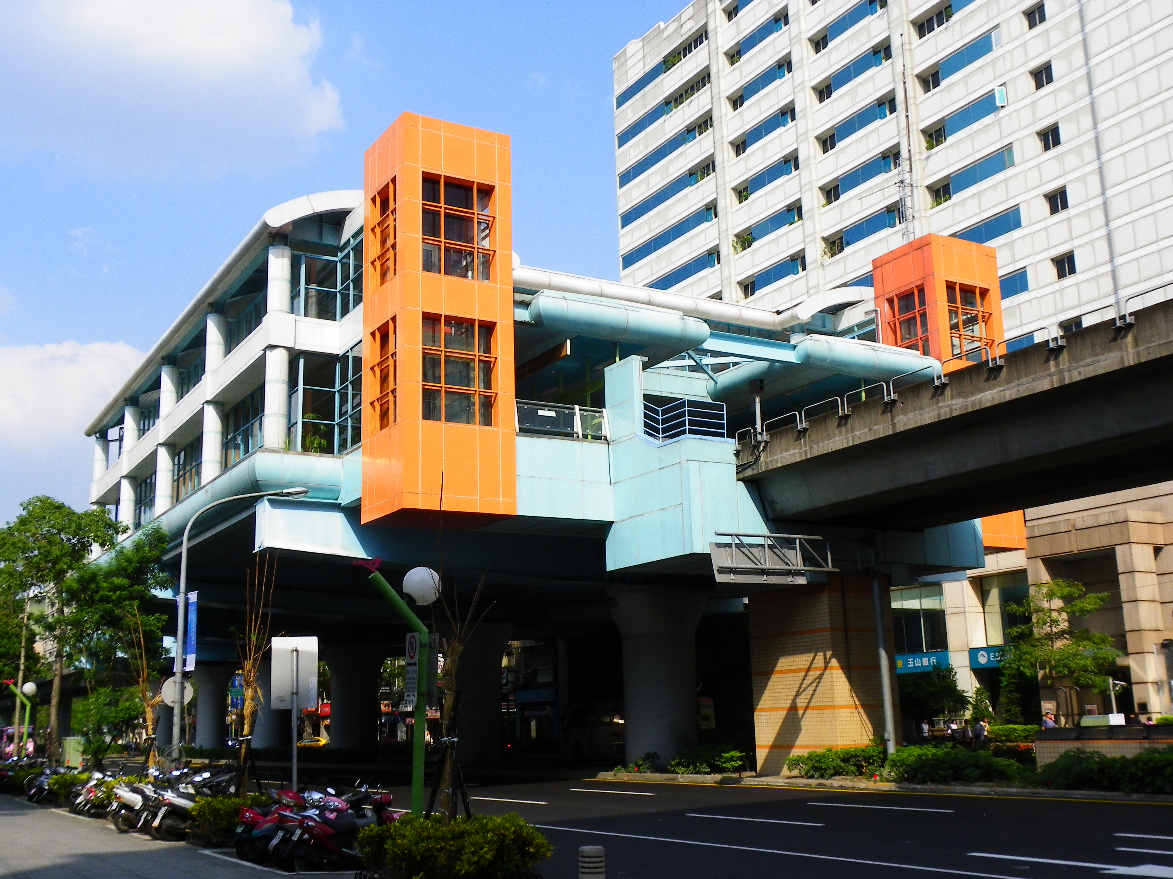 台北捷運文山線科技ビル駅。